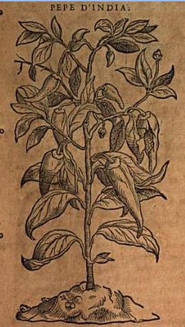 "pepe d'India" (Capsicum annuum) from Matthioli, Discorsi, 1573 ed., p. 405